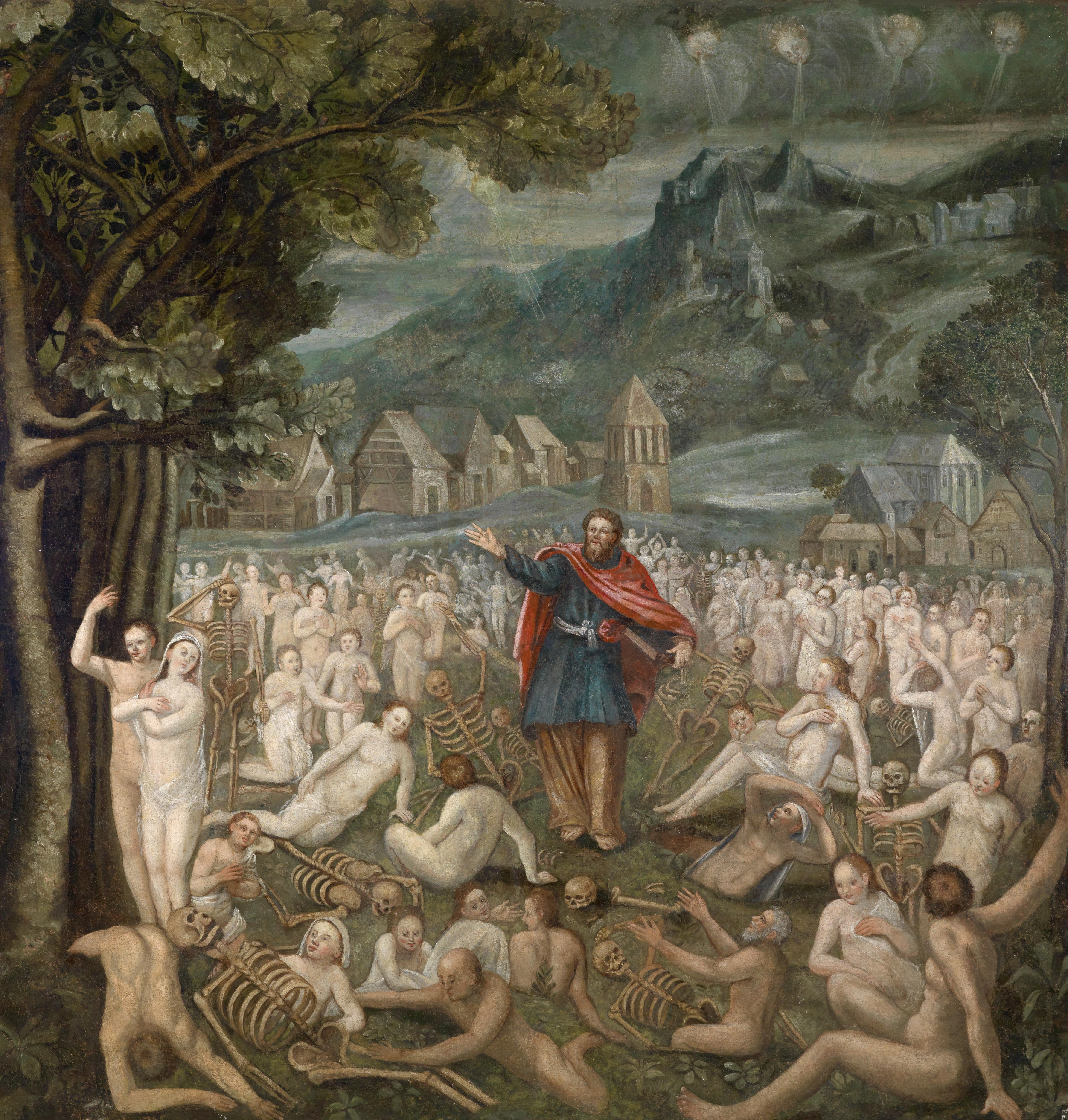 Vision des Ezechiel von der Auferstehung der Gebeine (Ezechiel 37, 1-14), Öl auf Leinwand, 161 x 154 cm, deutsche Schule des 17. Jahrhunderts